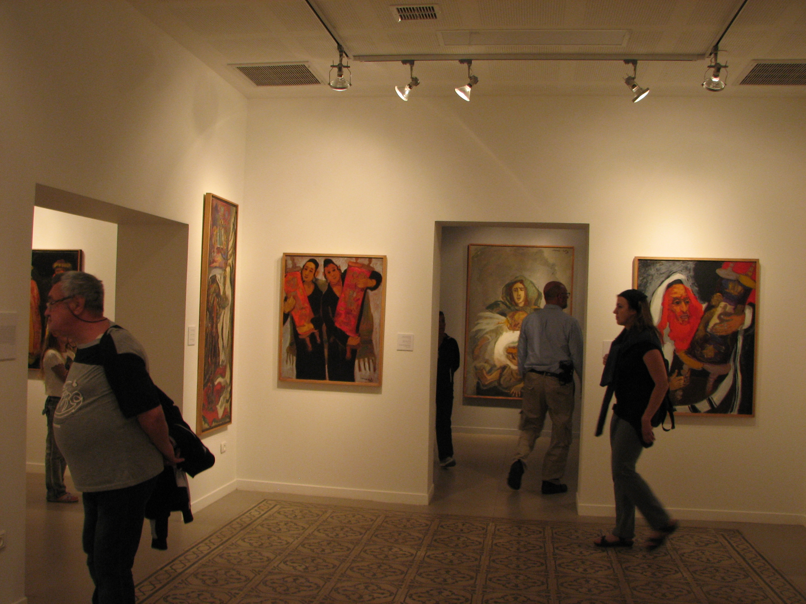 Mane Catz Museum , Haifa Israel Emmanuel Mané-Katz was a Jewish painterת best known for his depictions of the Jewish shtetl in Eastern Europe מוזיאון מאנה כץ הוא מוזיאון לאמנות בעיר חיפה, המוקדש ליצירתו של הצייר מאנה כץ. המוזיאון נמצא במרכז הכרמל ברחוב יפה נוף מבט כללי על אחד מחדרי מוזיאון